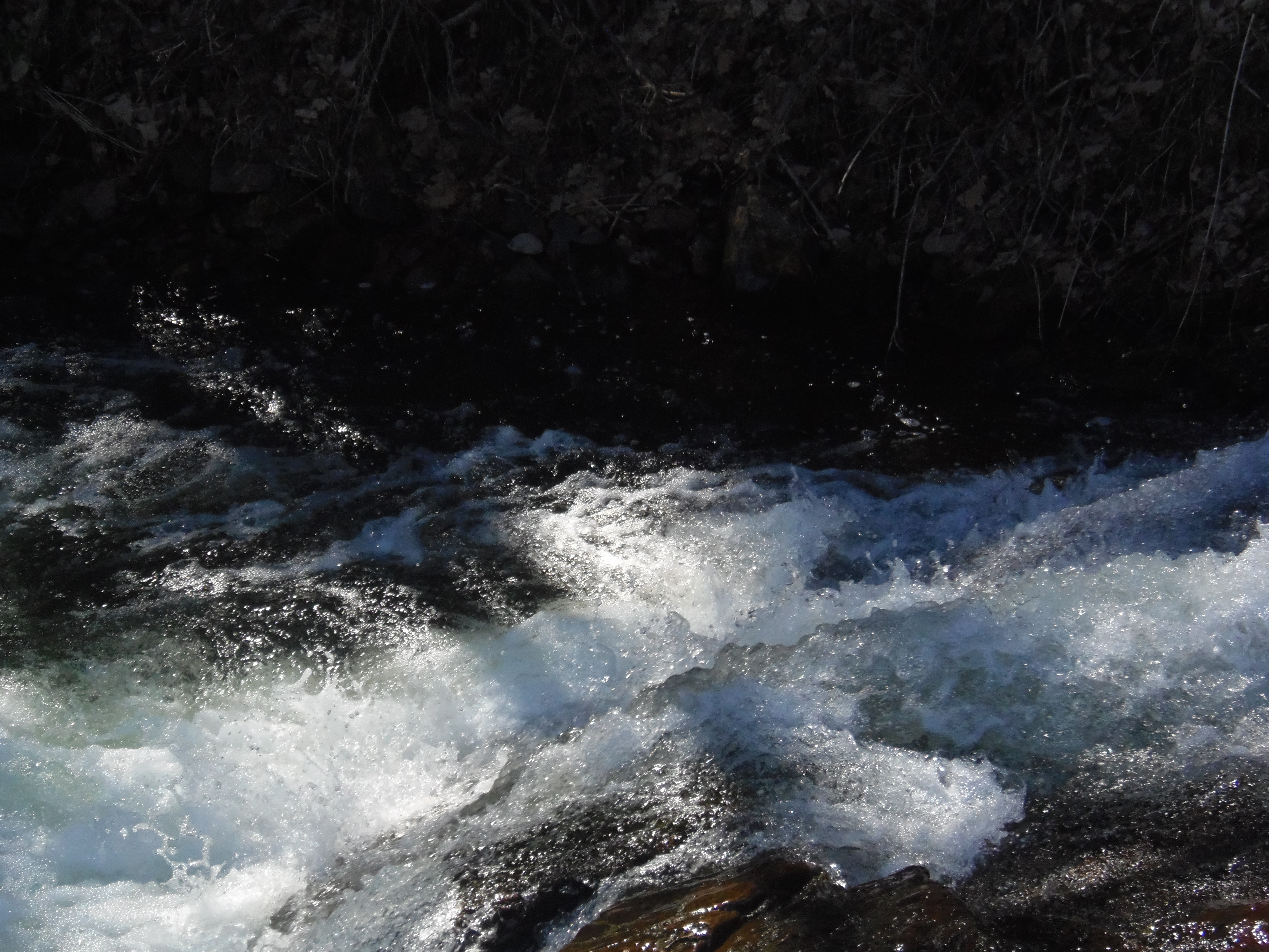 Бурное течение Һилеғорғо (Селигурга).Зуяк Белорецкий район. Башкортостан.